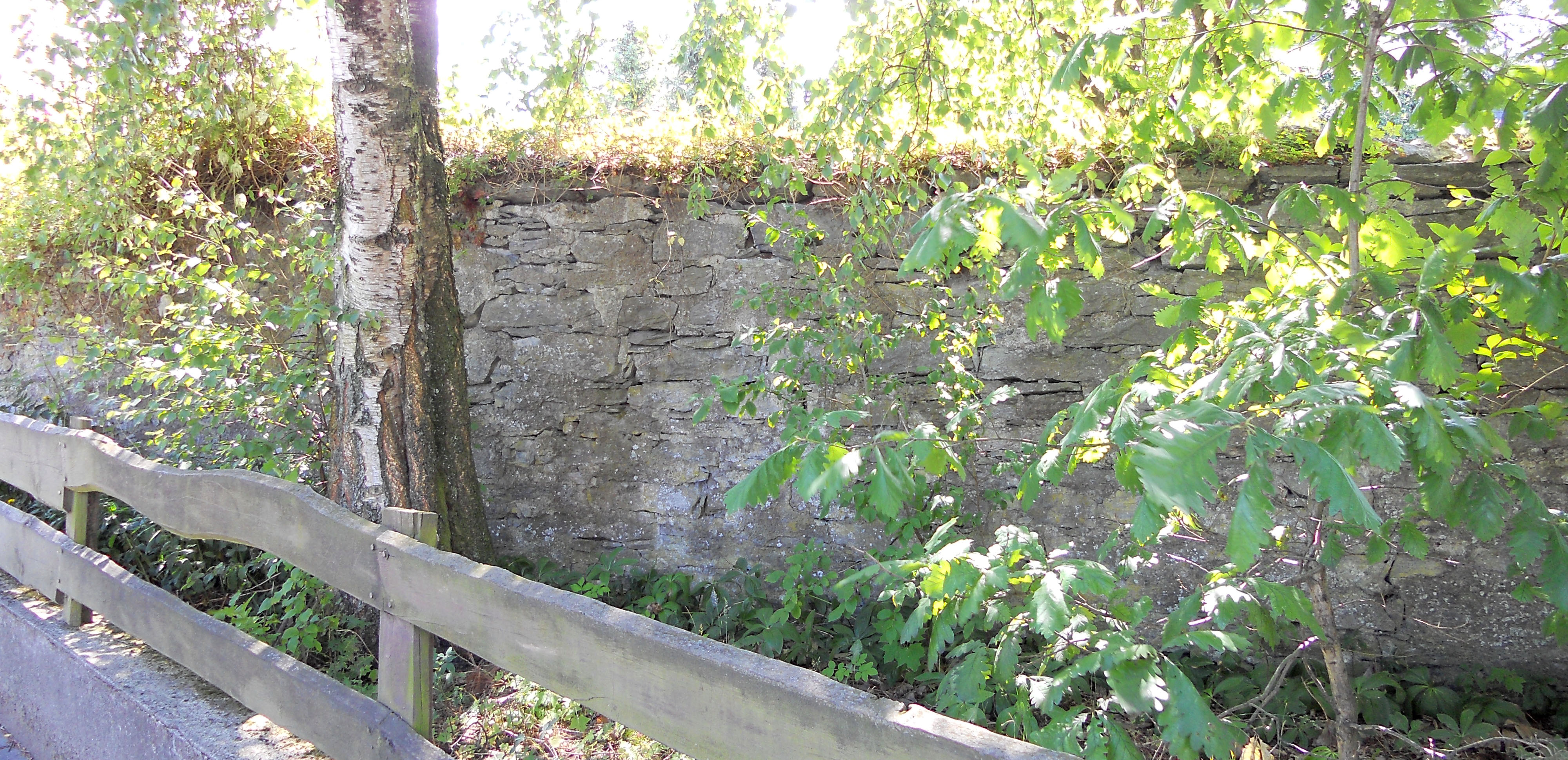 Fragment der Briloner Stadtmauer